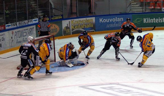 KooKoo-Jukurit 20.12.2007.